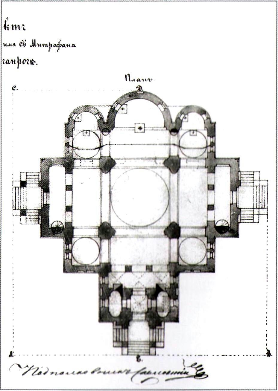 Вид Таганрога